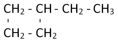 Funkční vzorec ethylcyklobutanu (Condensed formula of ethylcyclobutane)